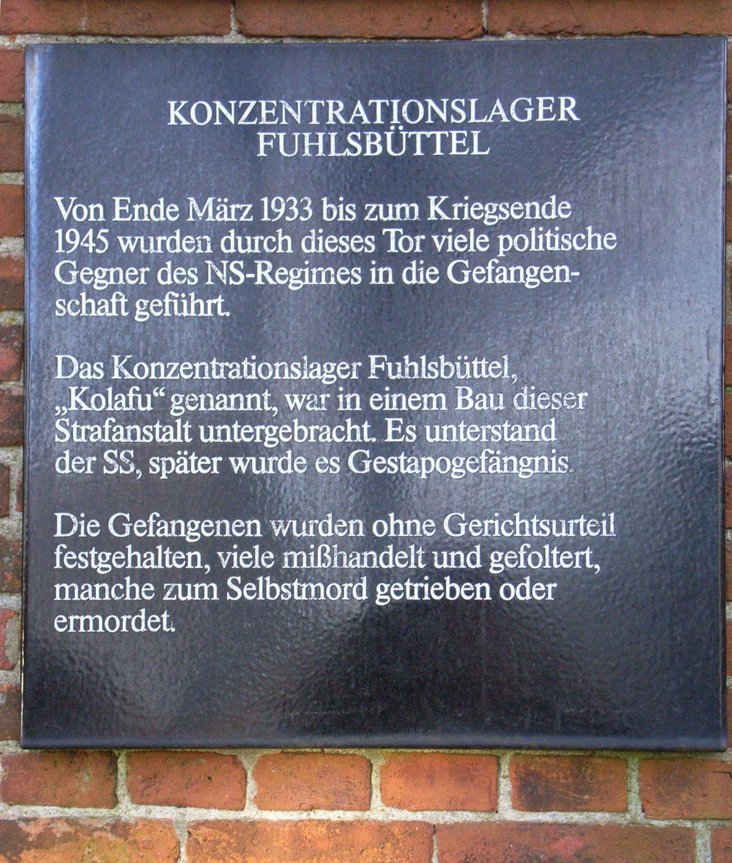 KZ Fuhlsbüttel - Hamburg - Gedenkstätte